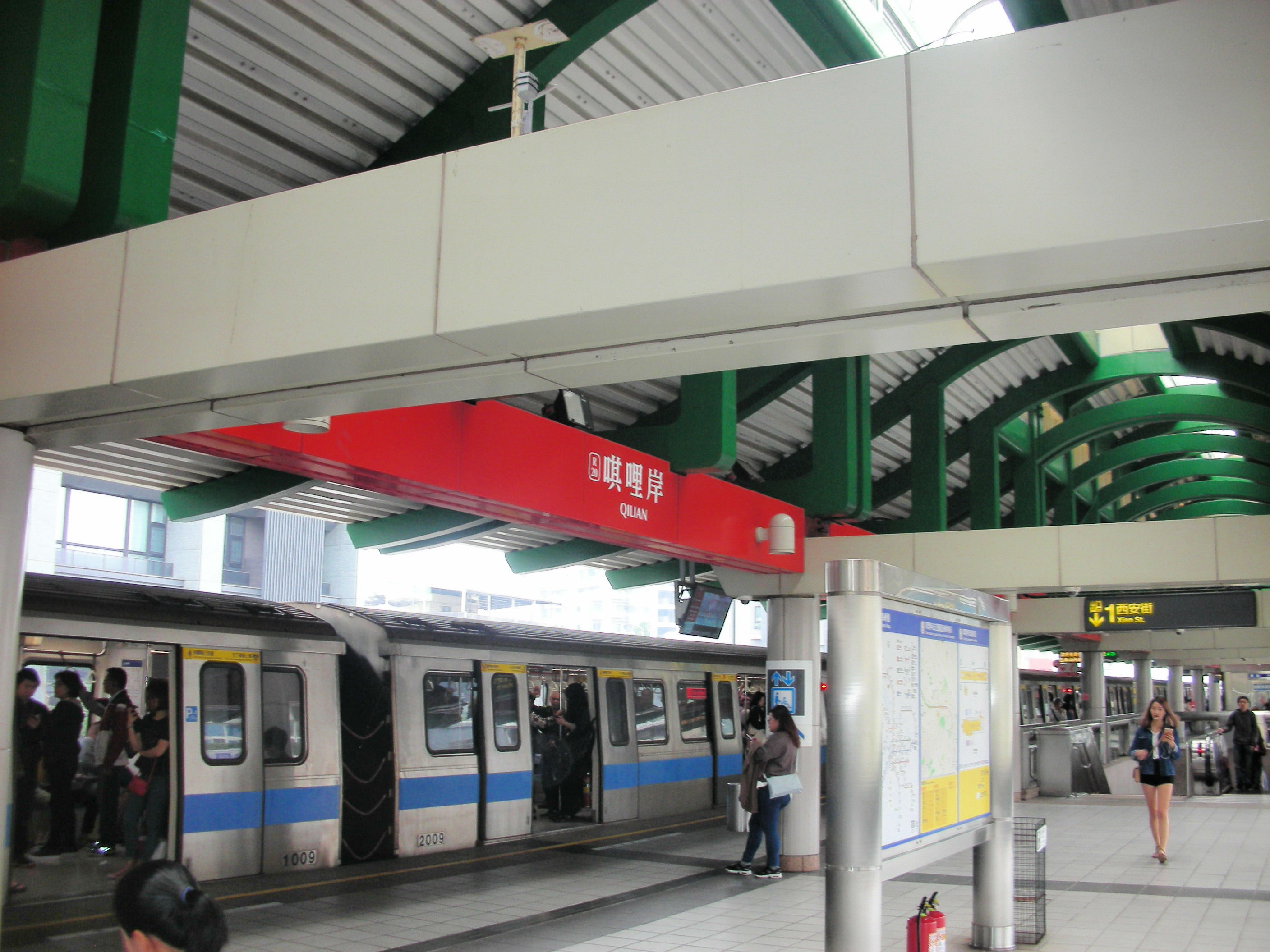 中文（台灣）: 台北捷運301型電聯車009號停靠唭哩岸站。